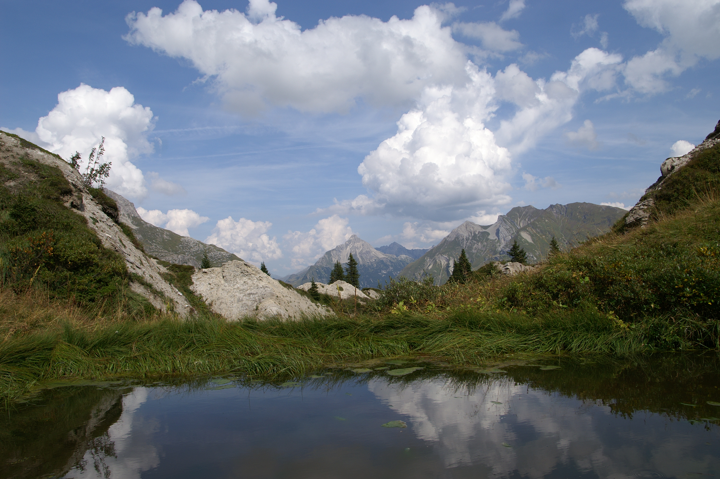 Naturschutzgebiet, Gipslöcher am Oberlech im Lechquellengebirge in Vorarlberg, eingerichtet 1988, 21 ha / im Hintergrund mittig der Biberkopf 2599m